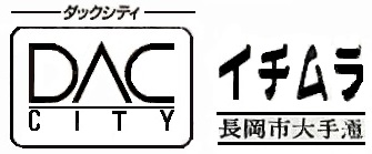 ダックシティとイチムラ長岡店のロゴ